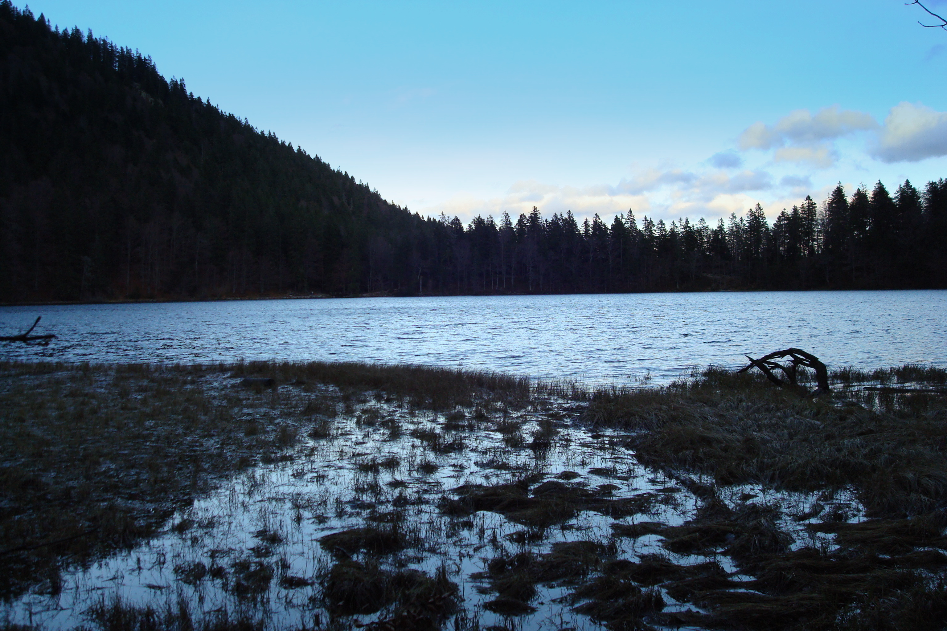 Blick über den Feldsee am Spätnachmittag von Westen nach Osten